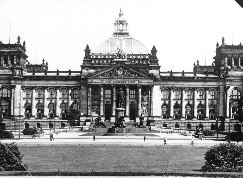 Berlin-Reichstagsgebäude (Vorkriegsaufnahme) Das ehemalige Reichstagsgebäude [sic] wurde 1884/94 von Paul Wallot im Stil der italienischen Hochrenaissance gebaut, war vielgliedrig angelegt und trug eine reiche Ornamentik. Trotzdem stellt es sich dem Beschauer in kraftvoller Geschlossenheit dar. 1933 wurde das Gebäude durch Brandstiftung stark zerstört und 1945 durch Artilleriebeschuß weiter beschädigt. Das Bild zeigt eine Vorkriegsaufnahme aus dem Jahre 1932, als das Gebäude noch unversehrt war. Der heute zerstörte Bau ist im Wiederaufbau begriffen. Der rechte Flügel wird für Ausschußsitzungen des Westdeutschen Bundestages und als Amtssitz für den Bundestagspräsidenten hergerichtet.